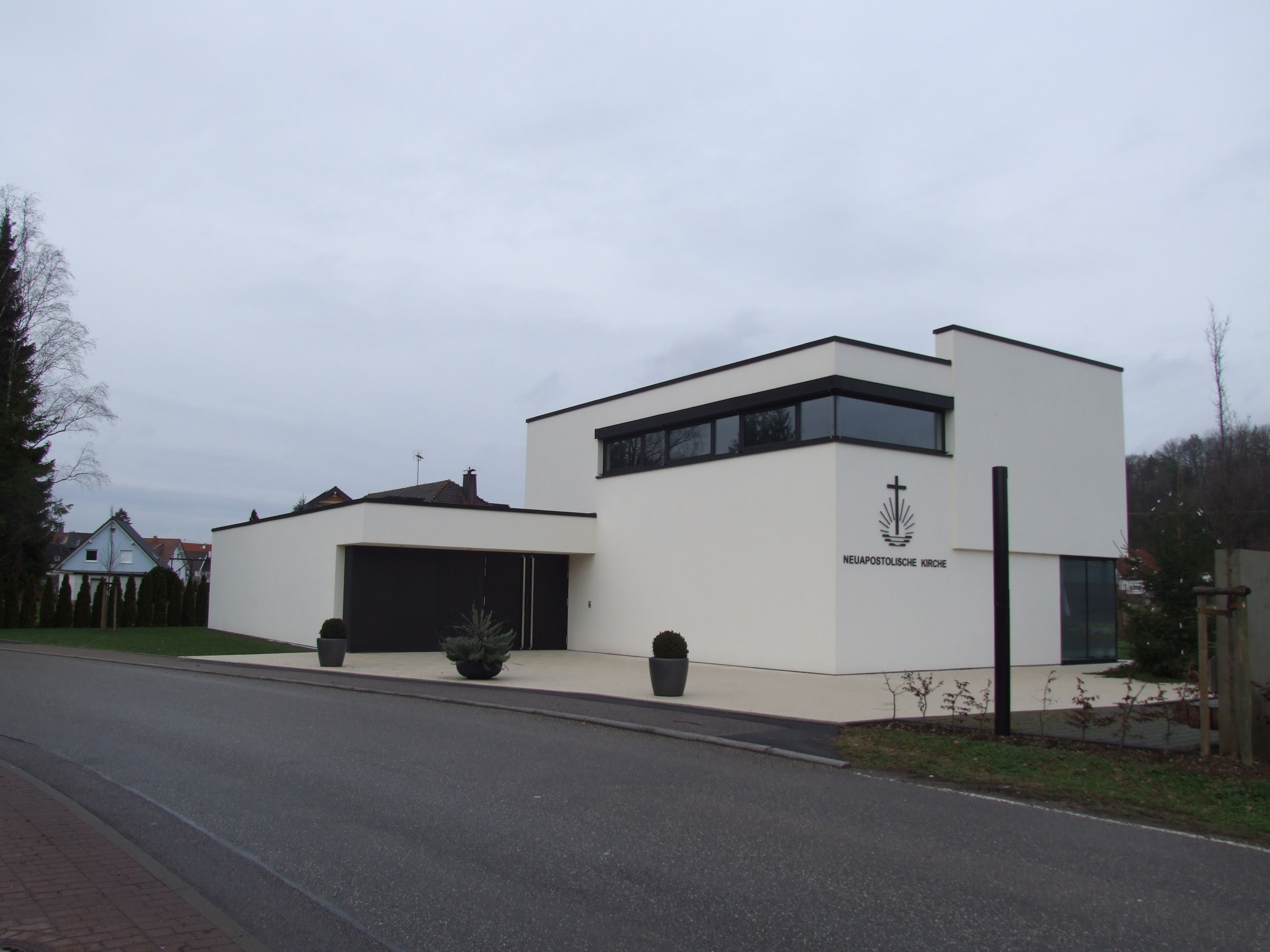 Neuapostolische Kirche Eschelbronn